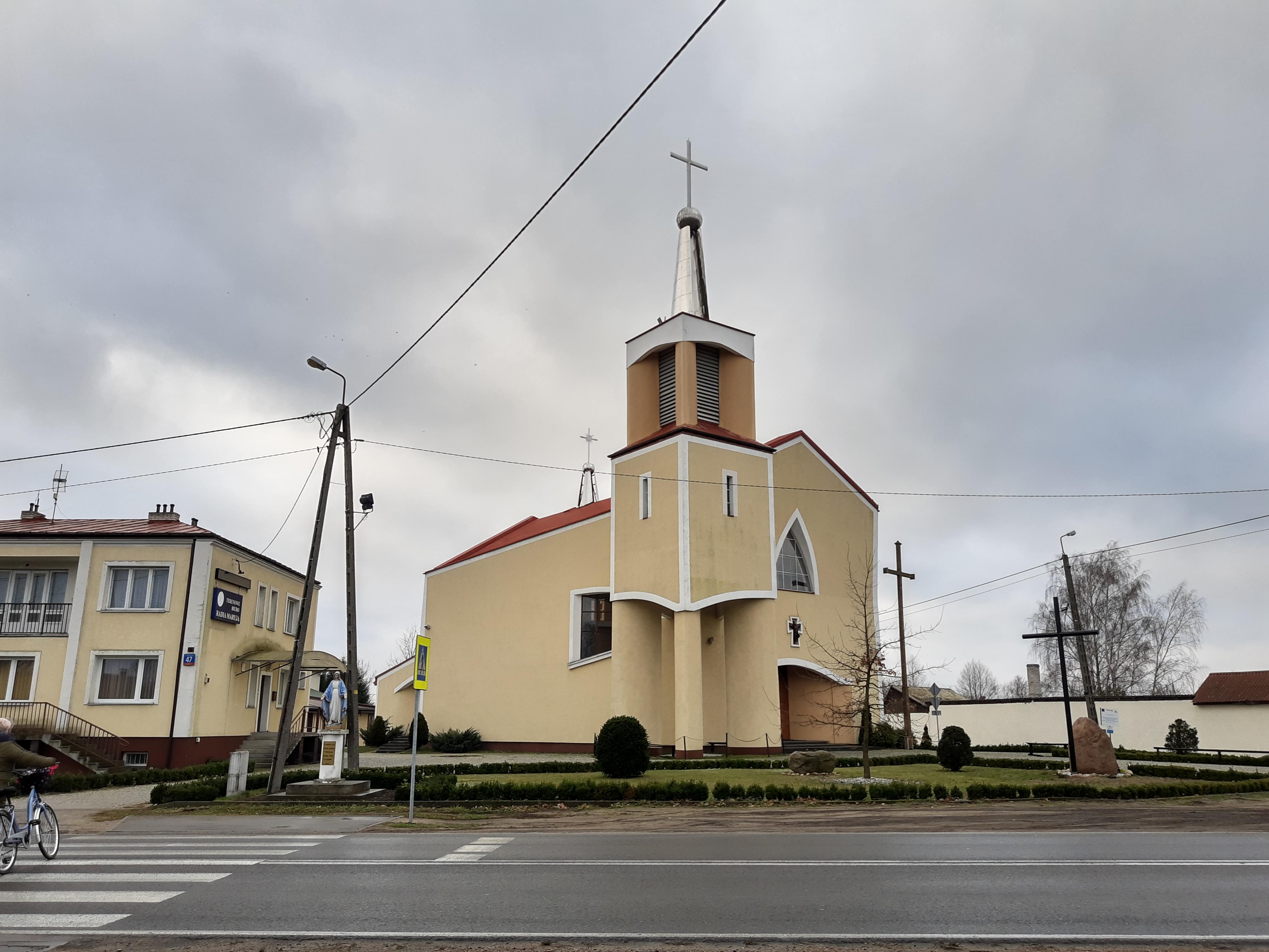 Budziska (gm. Łochów, pow. Węgrów) - kościół Św. Andrzeja Boboli